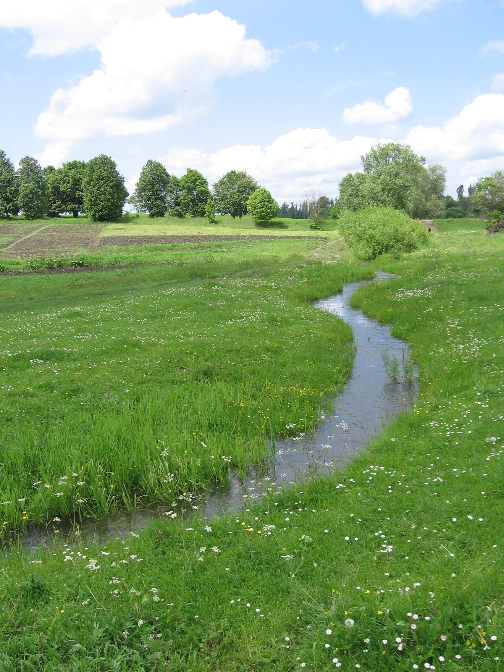 Річка Сошень, Сошенка на Заславщині.